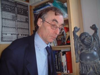 Robert Boyer economista francés